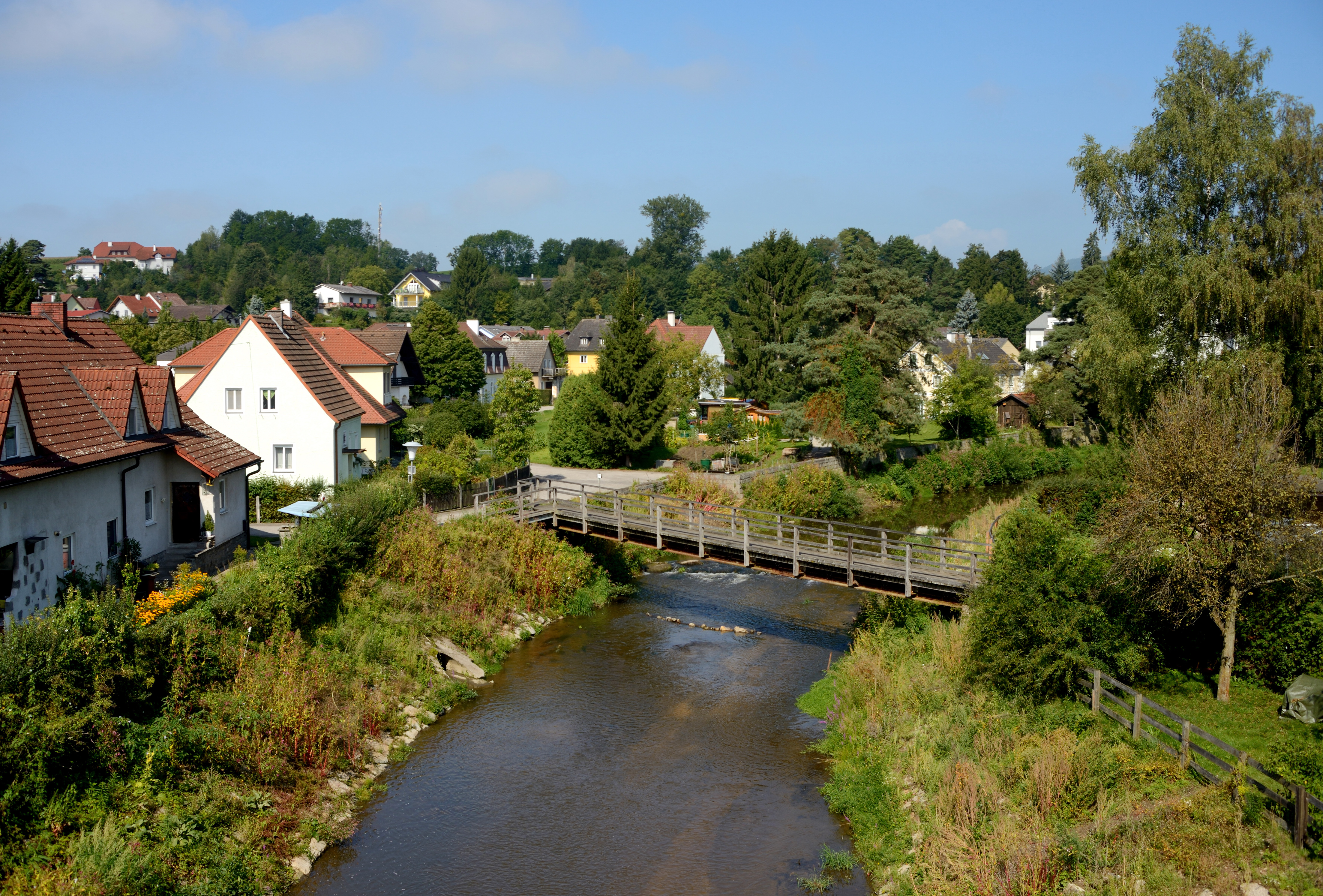 Gusen in St. Georgen.